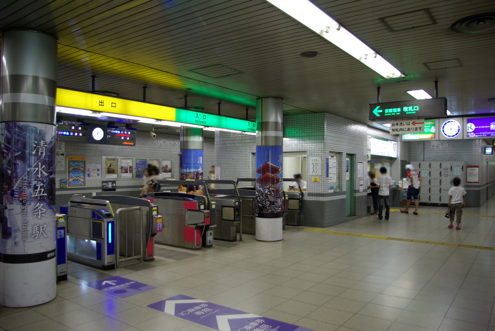 京阪電車清水五条駅